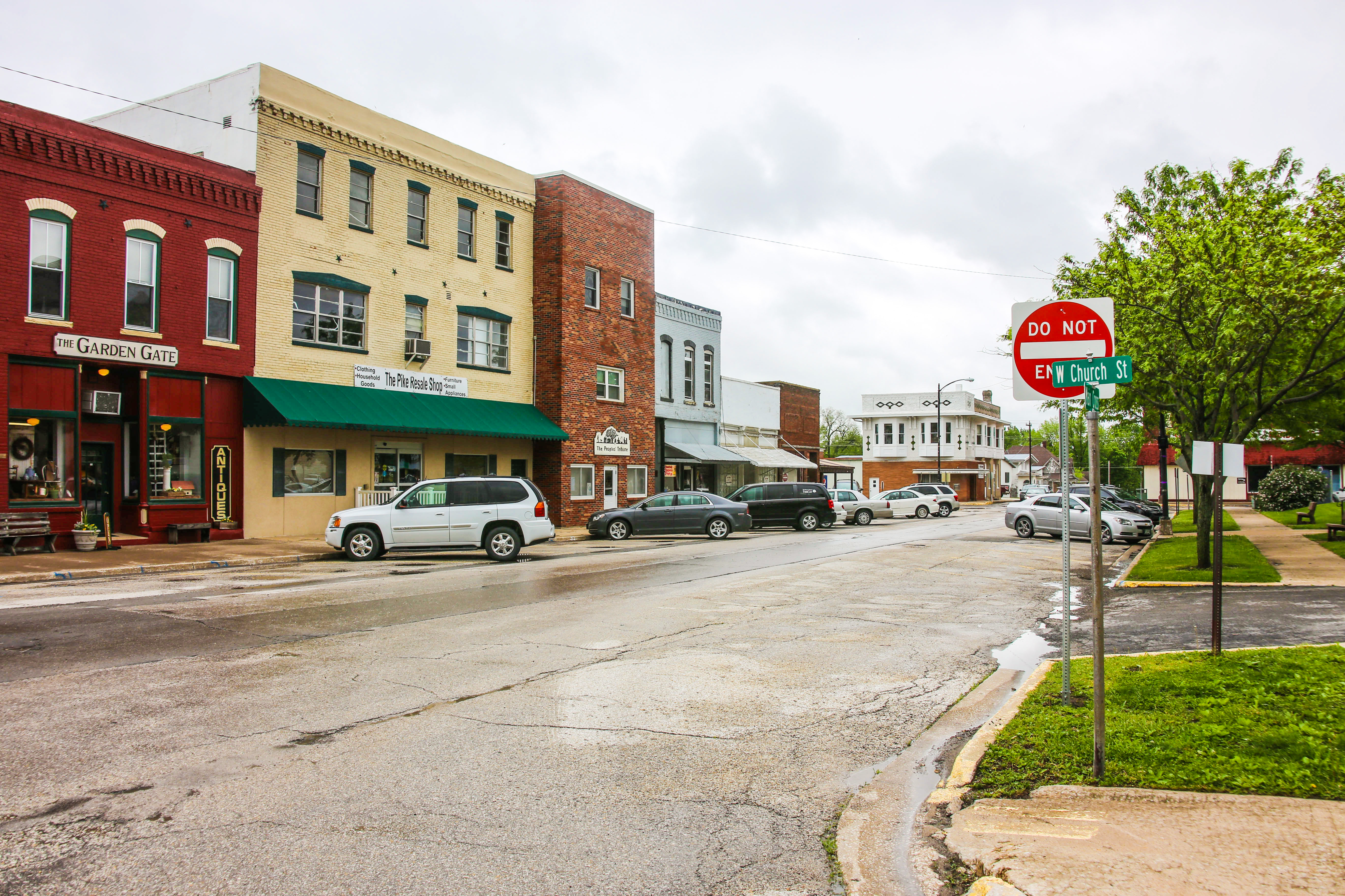 Bowling Green, MO